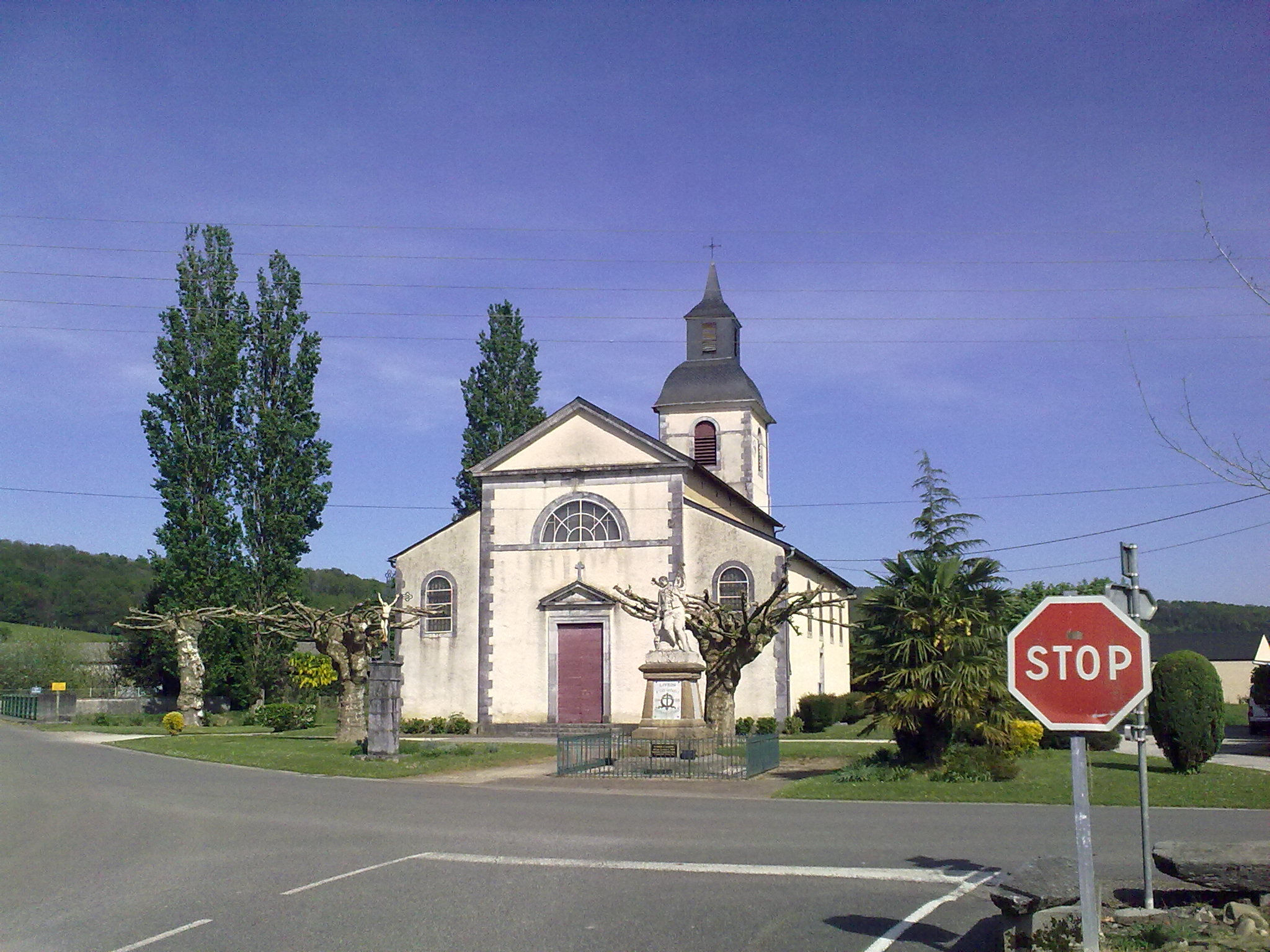 Livron, France